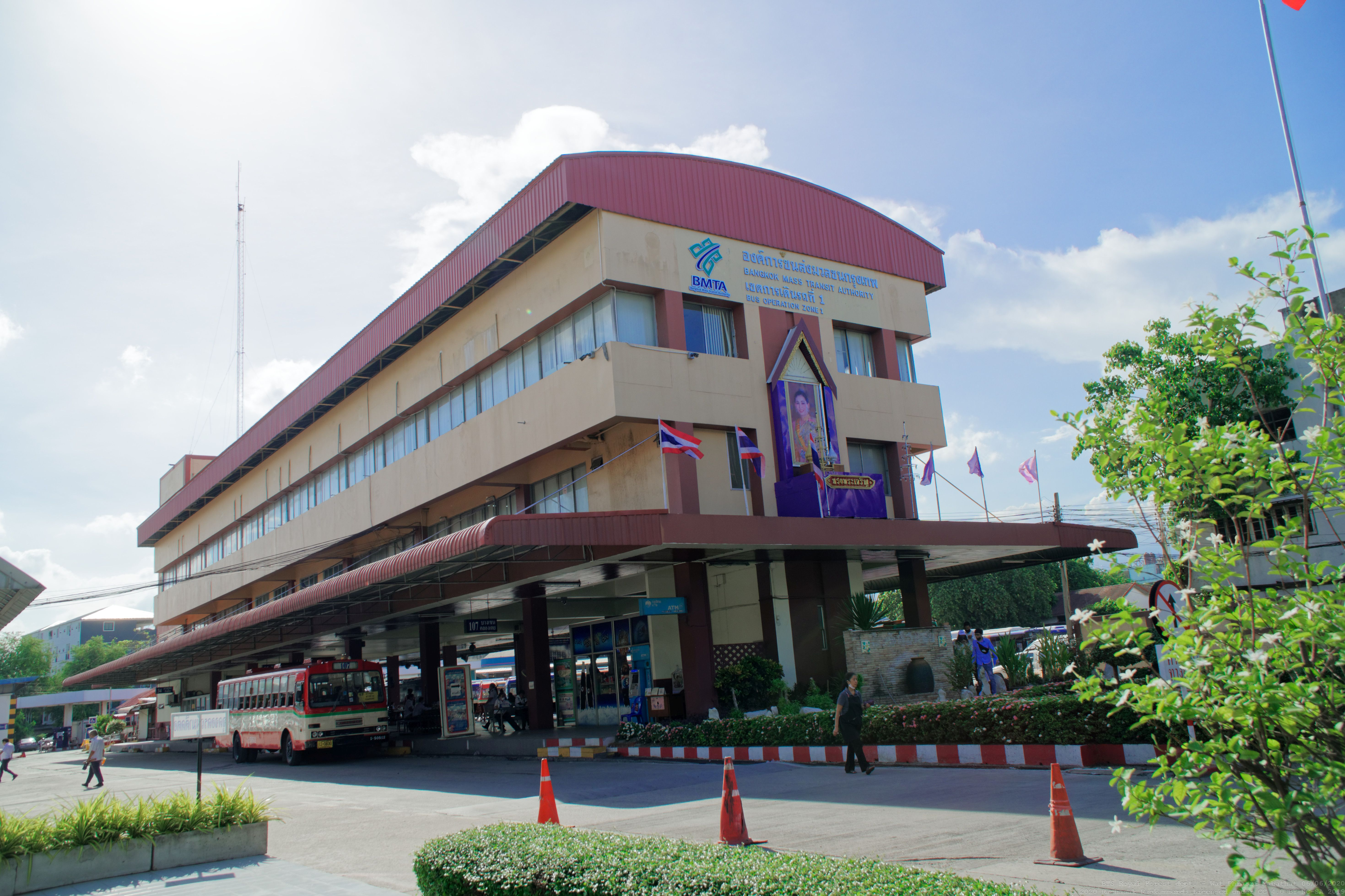 อู่รถเมล์บางเขน